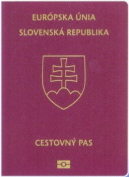 Slovak biometric passport